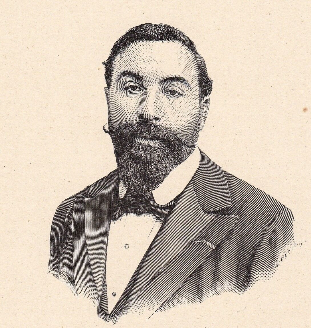 French sculptor François-Léon Sicard (1862-1934)